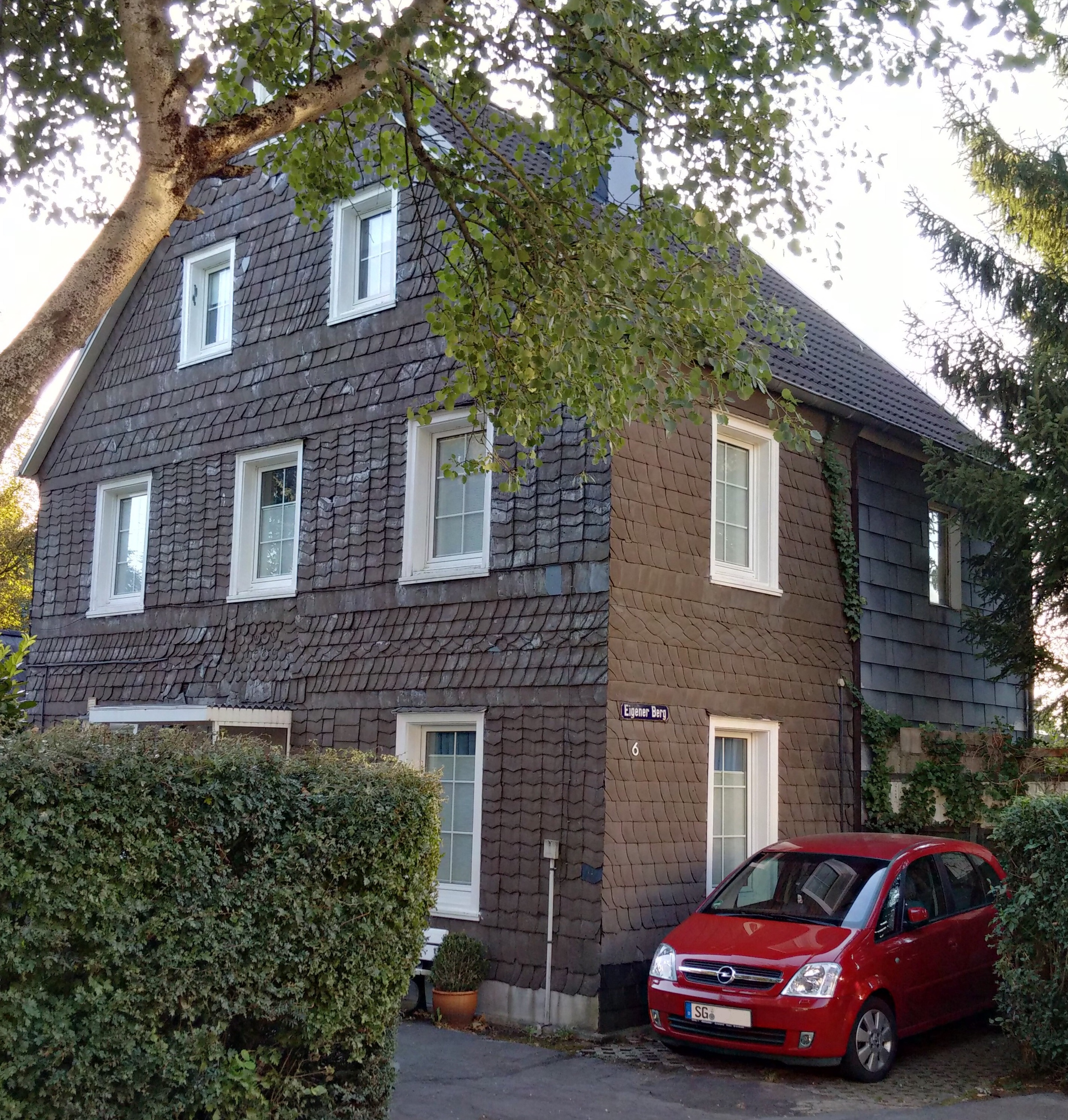 Fachwerkhaus in Eigener Berg in Solingen, aufgenommen im Sommer 2016